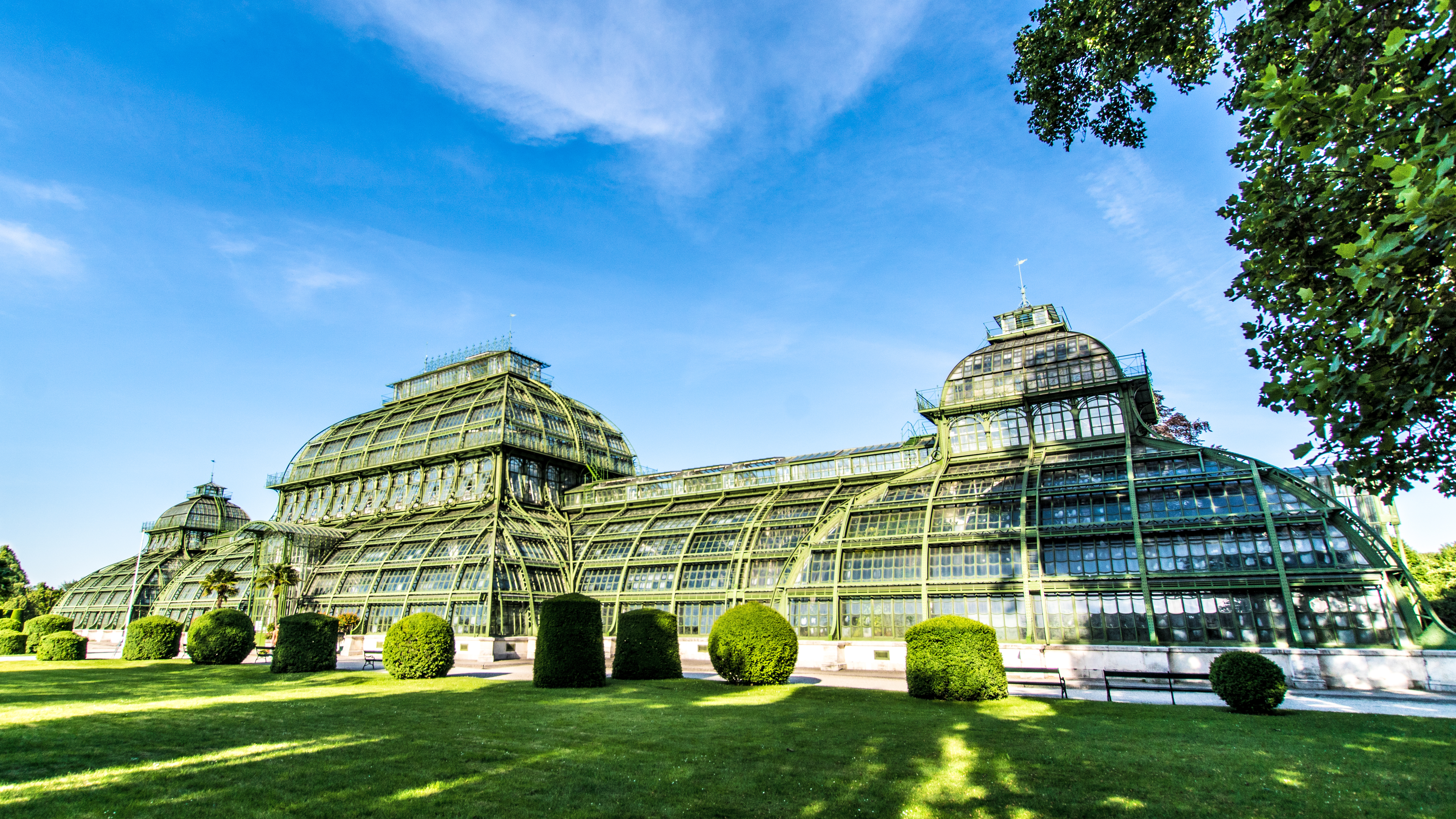 Seitenansicht des Palmenhauses im Schlosspark Schönbrunn